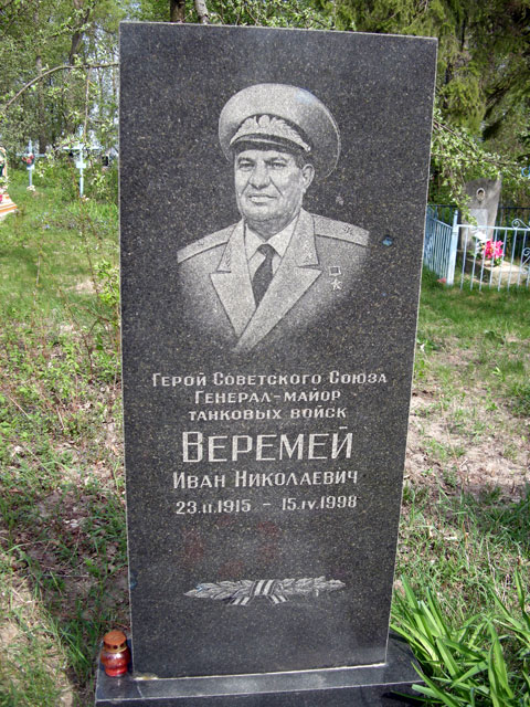 могила героя СРСР Веремія Івана Миколайовича в його рідному селі Орлівка Куликівського району Чернігівської області